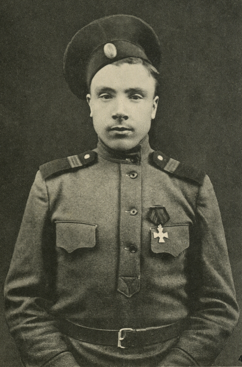 Тимофей Иванович Кирпичников, подпрапорщик лейб-гвардии Волынского полка, участник Февральской революции.